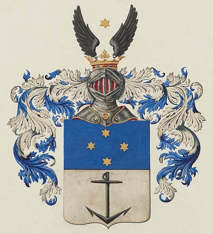 Дворянский герб, жалованный императором Николаем I действительному статскому советнику Ивану Михайловичу Симонову 19 апреля 1846 г. The noble coat of arms of the State Councilor Ivan Mikhailovich Simonov, granted by the Emperor Nicholas I on April 19, 1846.